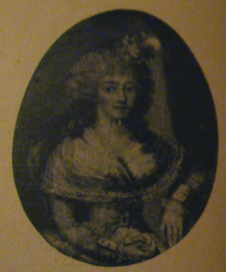 Retrato de Francisca Silveira de Ibarrola, patricia argentina